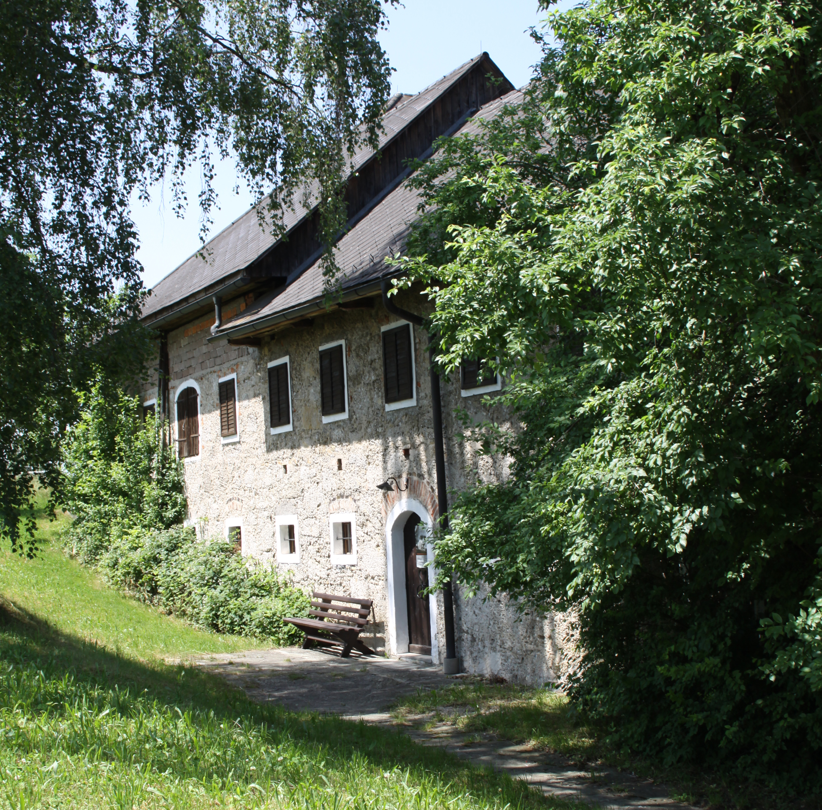 Thomas Bernhard Haus, Blick von der Strasse